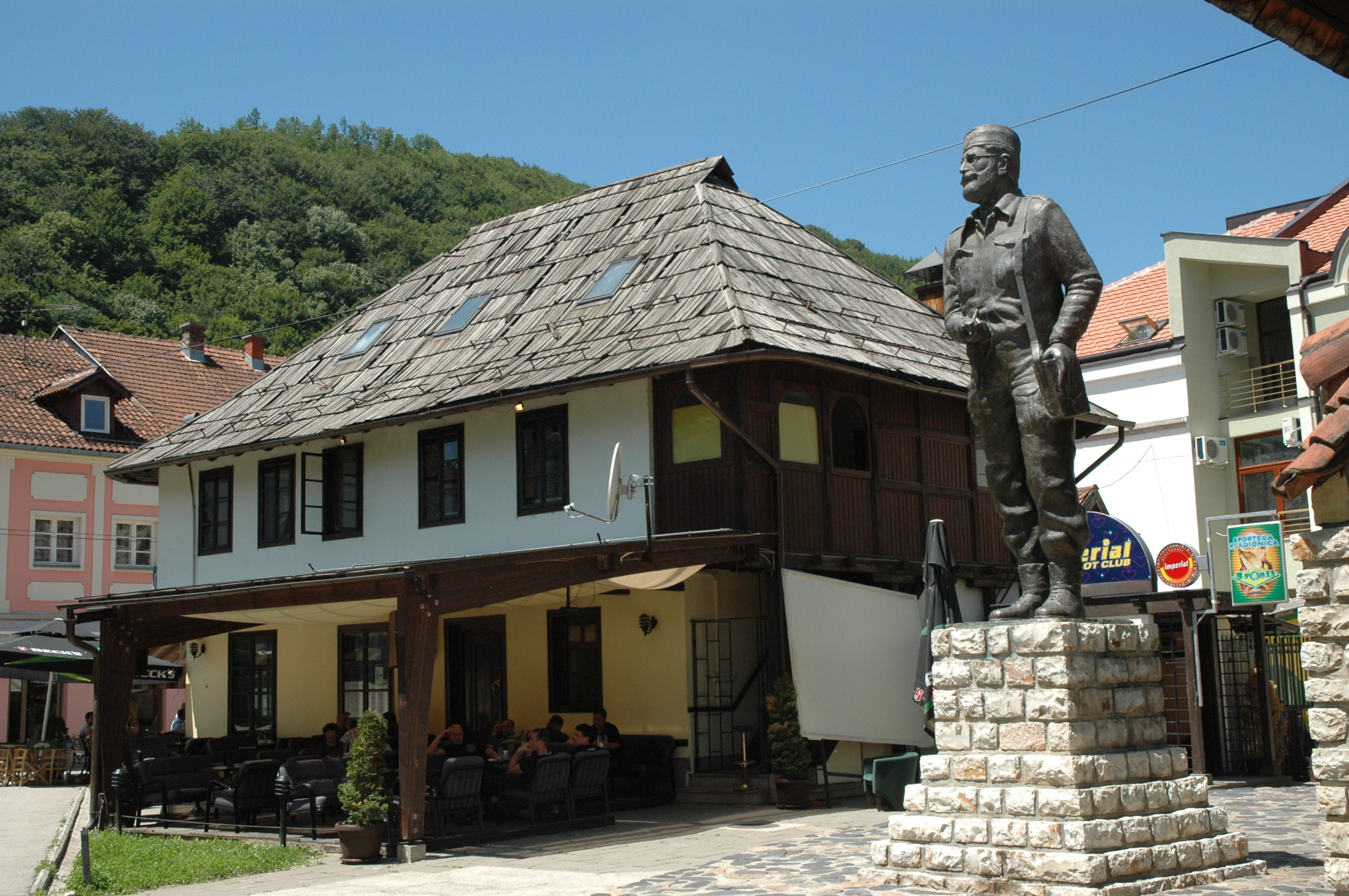 Jeremića kuća